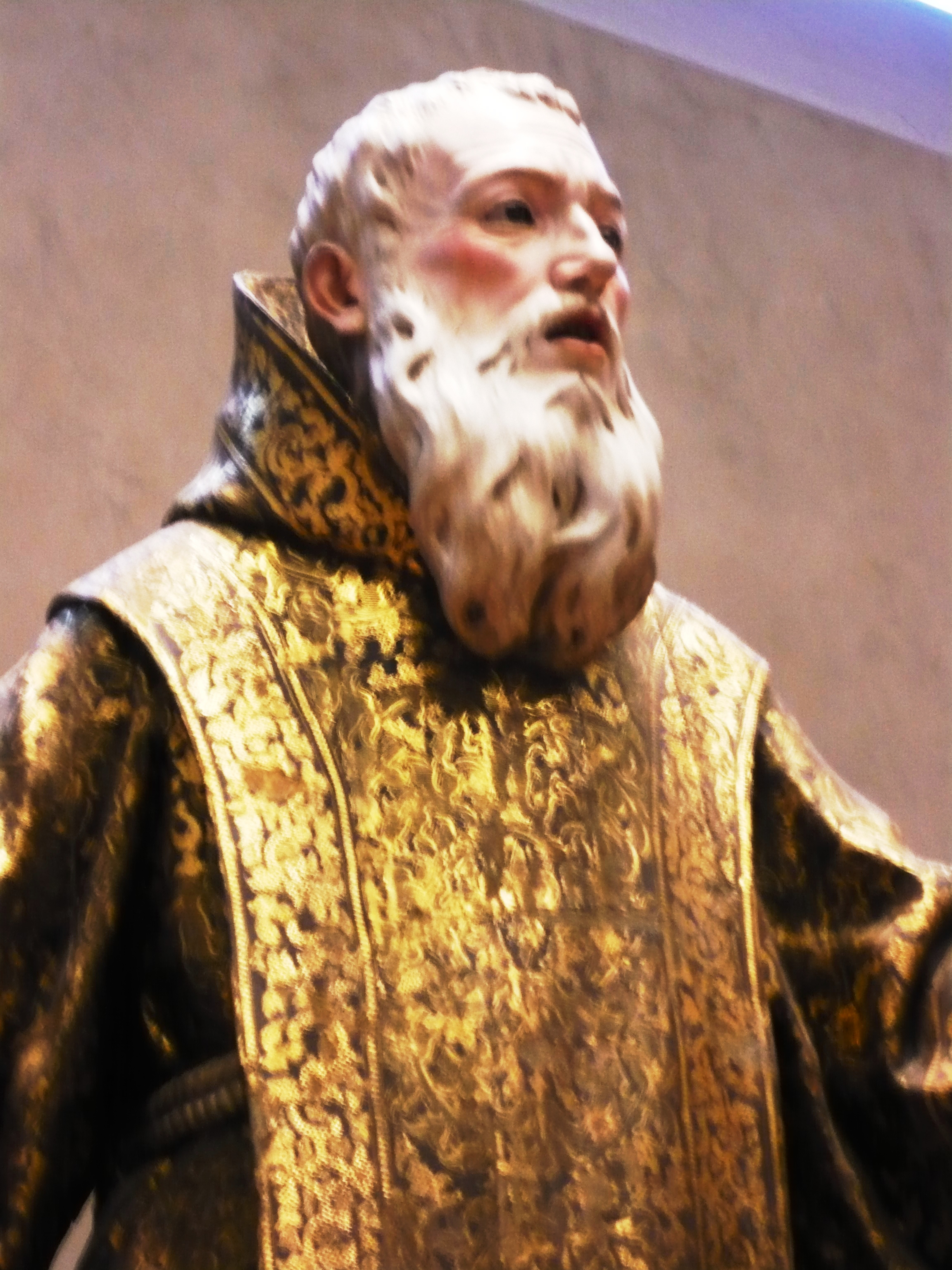 w:Saint Ginés de la Jara (also known as Ginés de la Xara, Ginés el Franco, Genesius Sciarensis), semi-legendary saint of Spain. Statue by "La Roldana," Luisa Roldán.